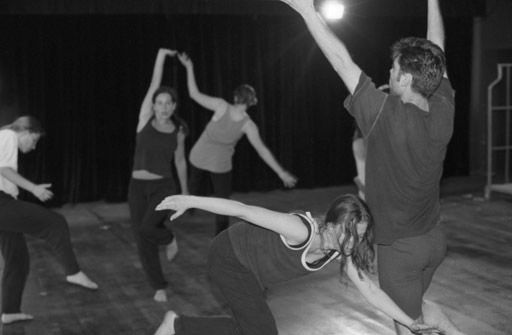 Studierende am Lehr- und Lerntheater Bayerische Theaterakademie August Everding in München, 1998 Aufnahme aus der Reportage „Eine Szene machen, Regie, Schauspiel, Tanz und Gesang und - Kritik: Ein Streifzug durch die Bayerische Theaterakademie“, S. 64-80. In: Prinzregententheater, Jahrbuch 1999 C. Hartmann Verlag ISBN 3980610519